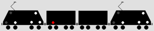 Beleuchtung ungekuppelte Schiebelokomotive in der Schweiz